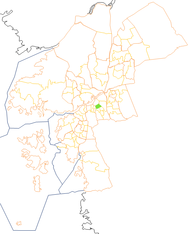 Karta som visar primärområdes belägenhet i Göteborg